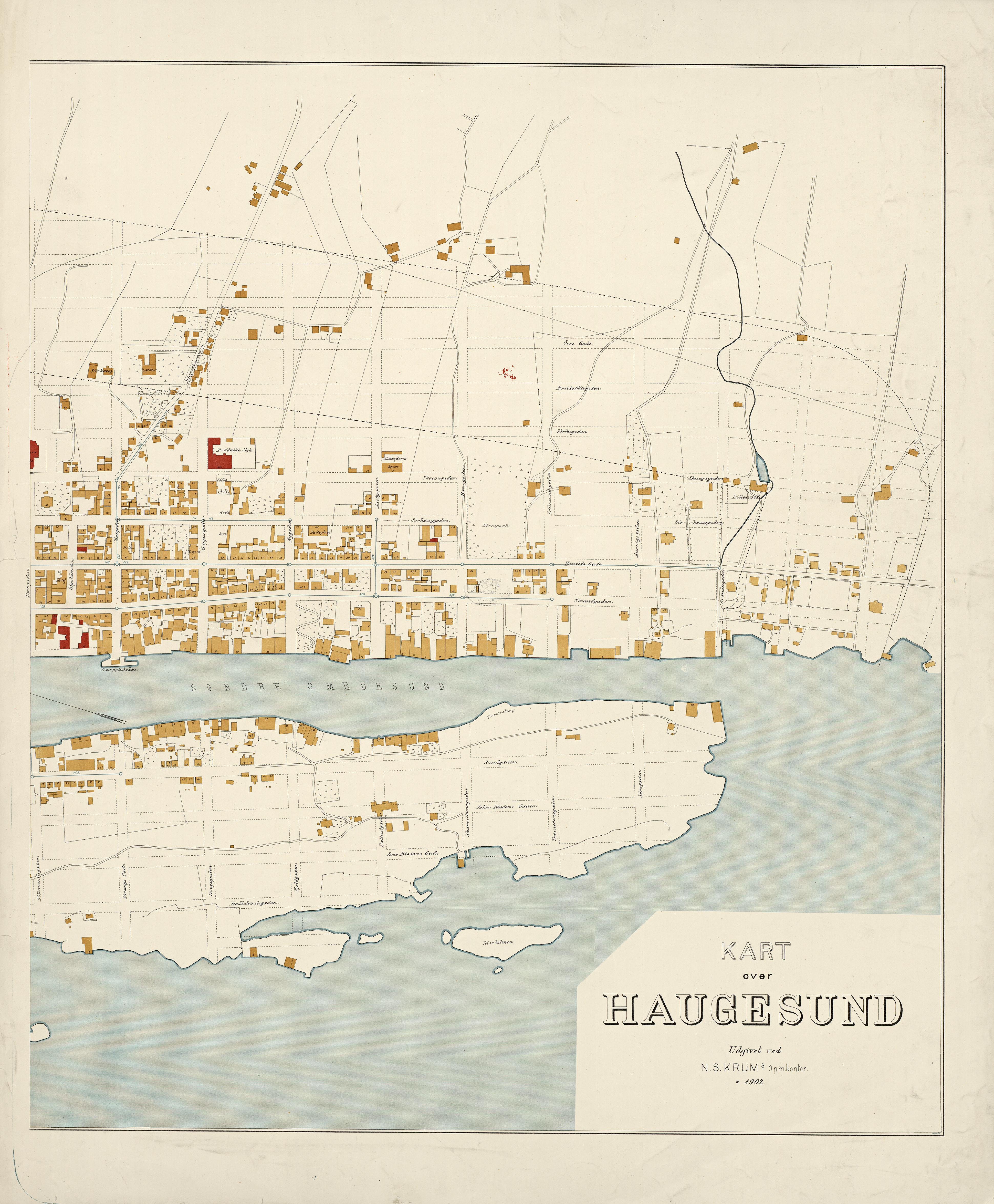 Kart over Haugebund (1902) blad 1/2